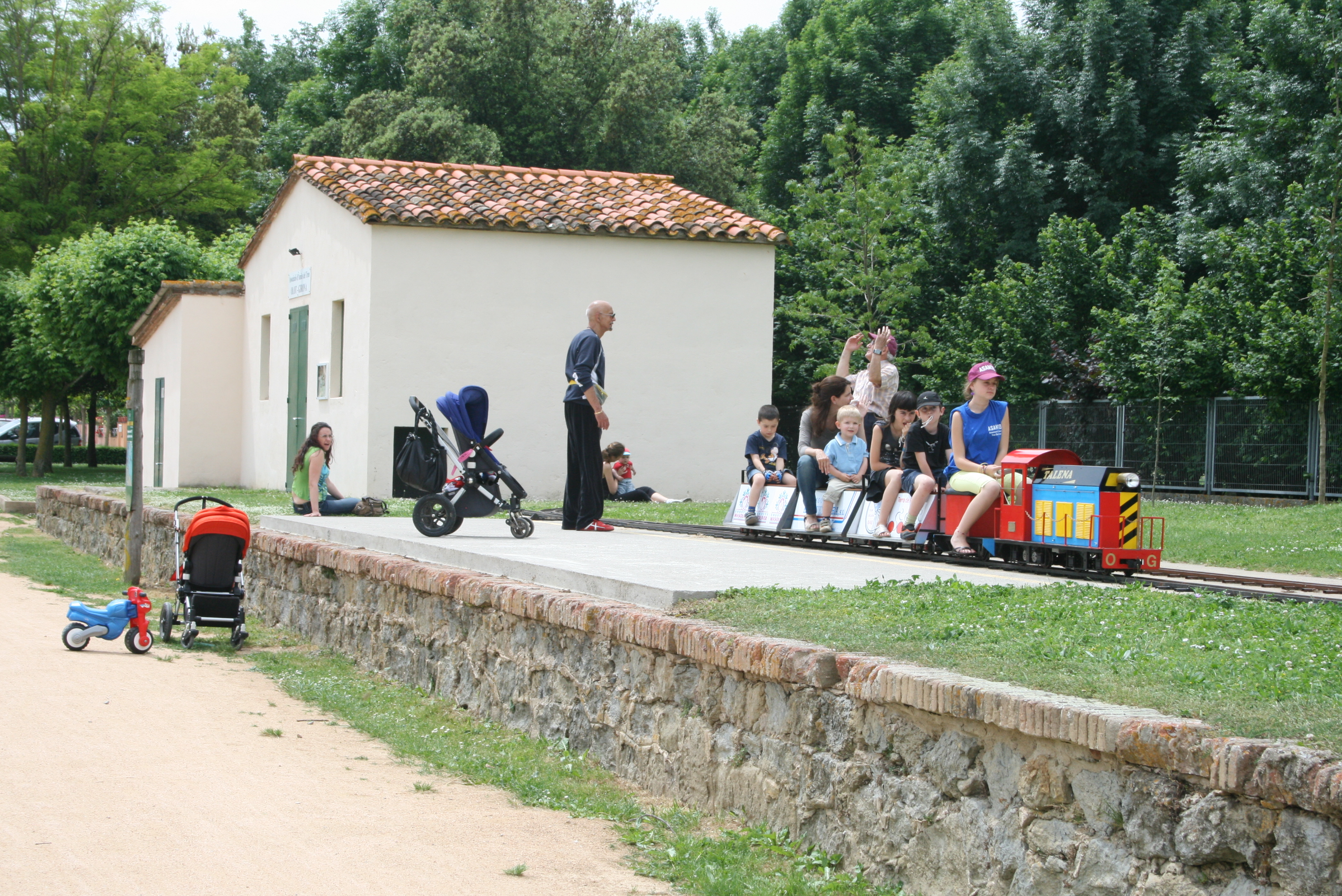 Local social de l'Associació Amics del Tren Olot-Girona, situat a l'antic magatzem de mercaderies de l'estació de Sant Esteve d'en Bas (municipi de La Vall d'en Bas). Al costat del local social hi ha un circuit de tren tripulat de 5 polzades que fa un recorregut pel Parc de l'Estació de Sant Esteve d'en Bas